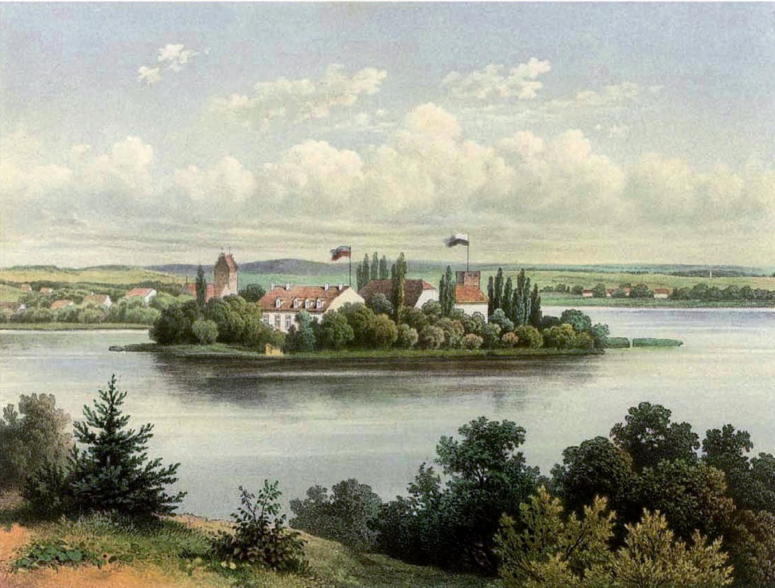 Schloss Teupitz, Lithografie aus dem 19. Jahrhundert